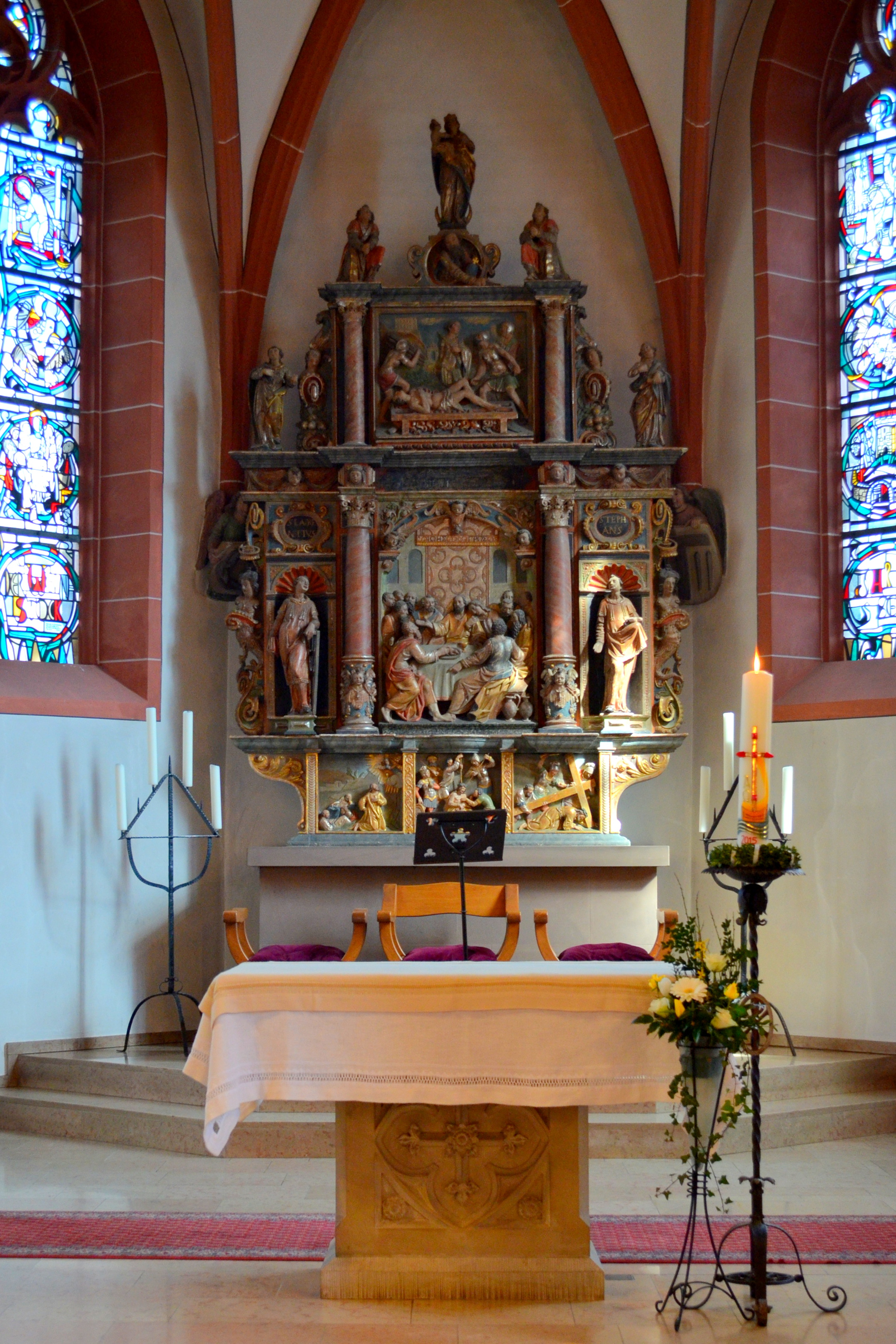 Hoogaltaar